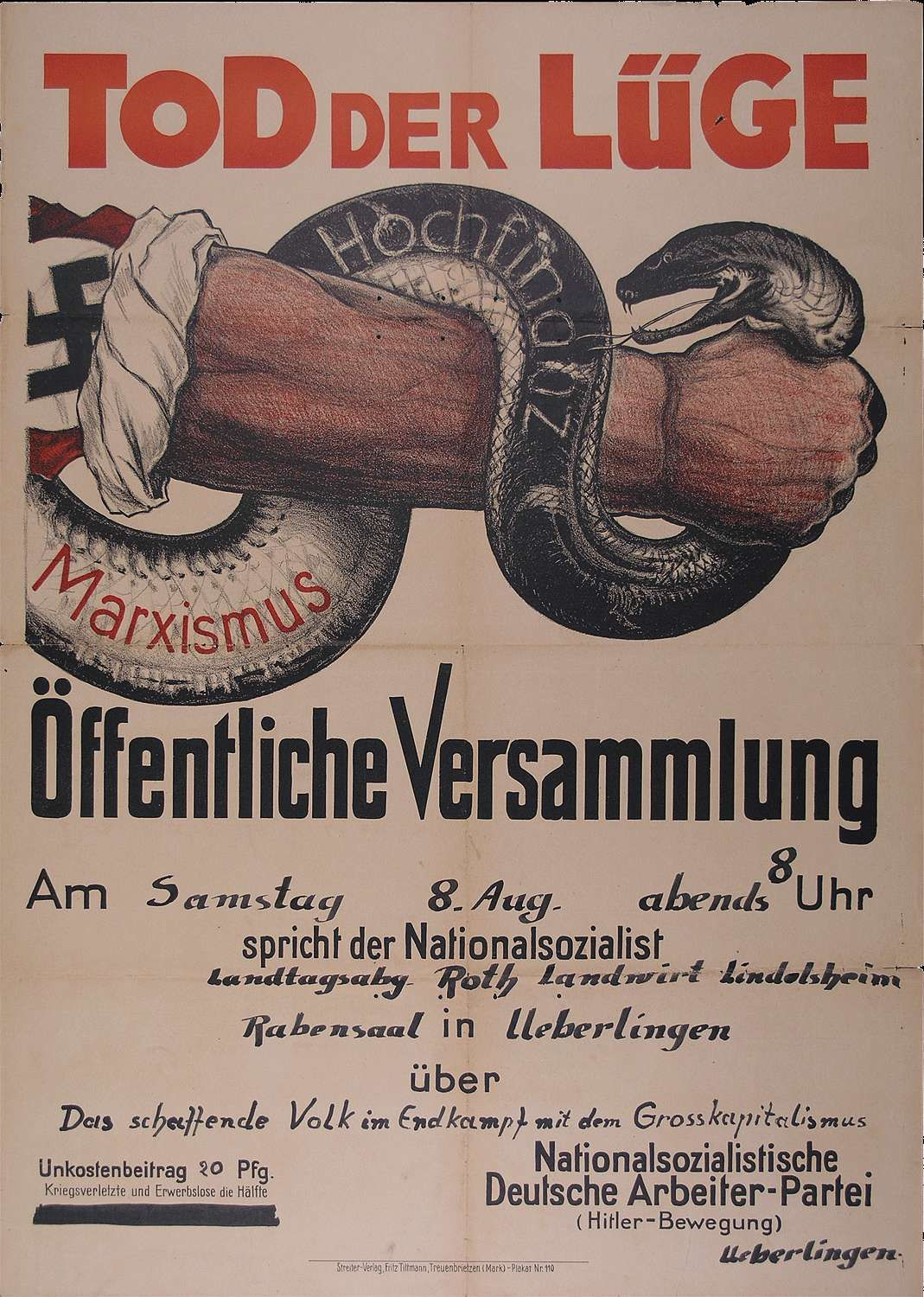 "Tod der Lüge", Öffentliche Versammlung im Rabensaal Überlingen (NSDAP)